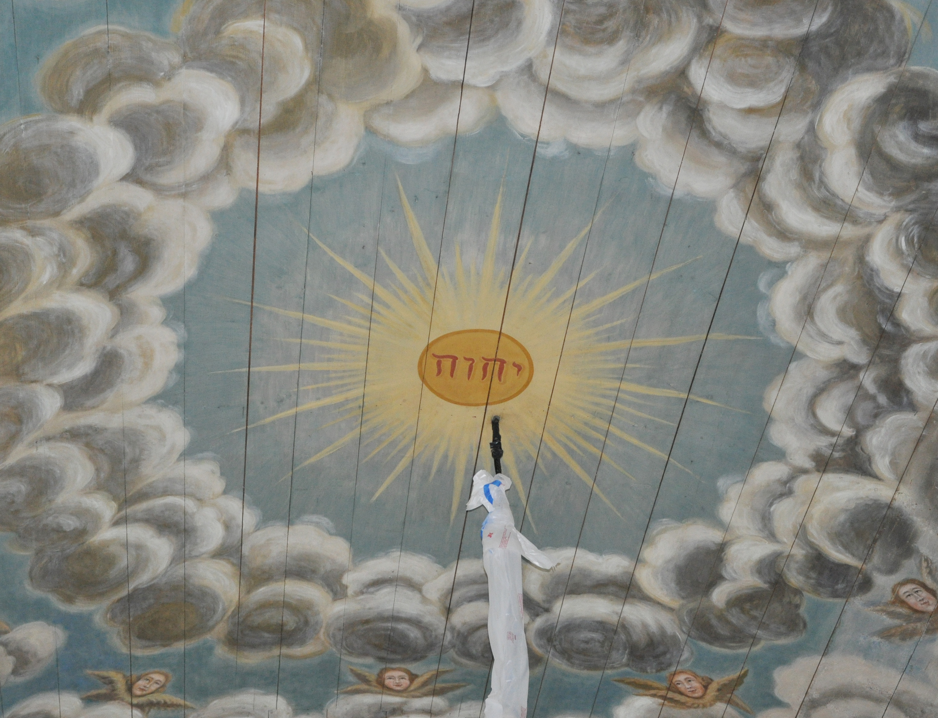 Takmålning med tetragrammet JHWH i Sällstorps kyrka